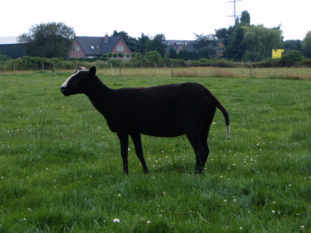 Een mooi type Zwartbles. De wigvorm is duidelijk te zien.